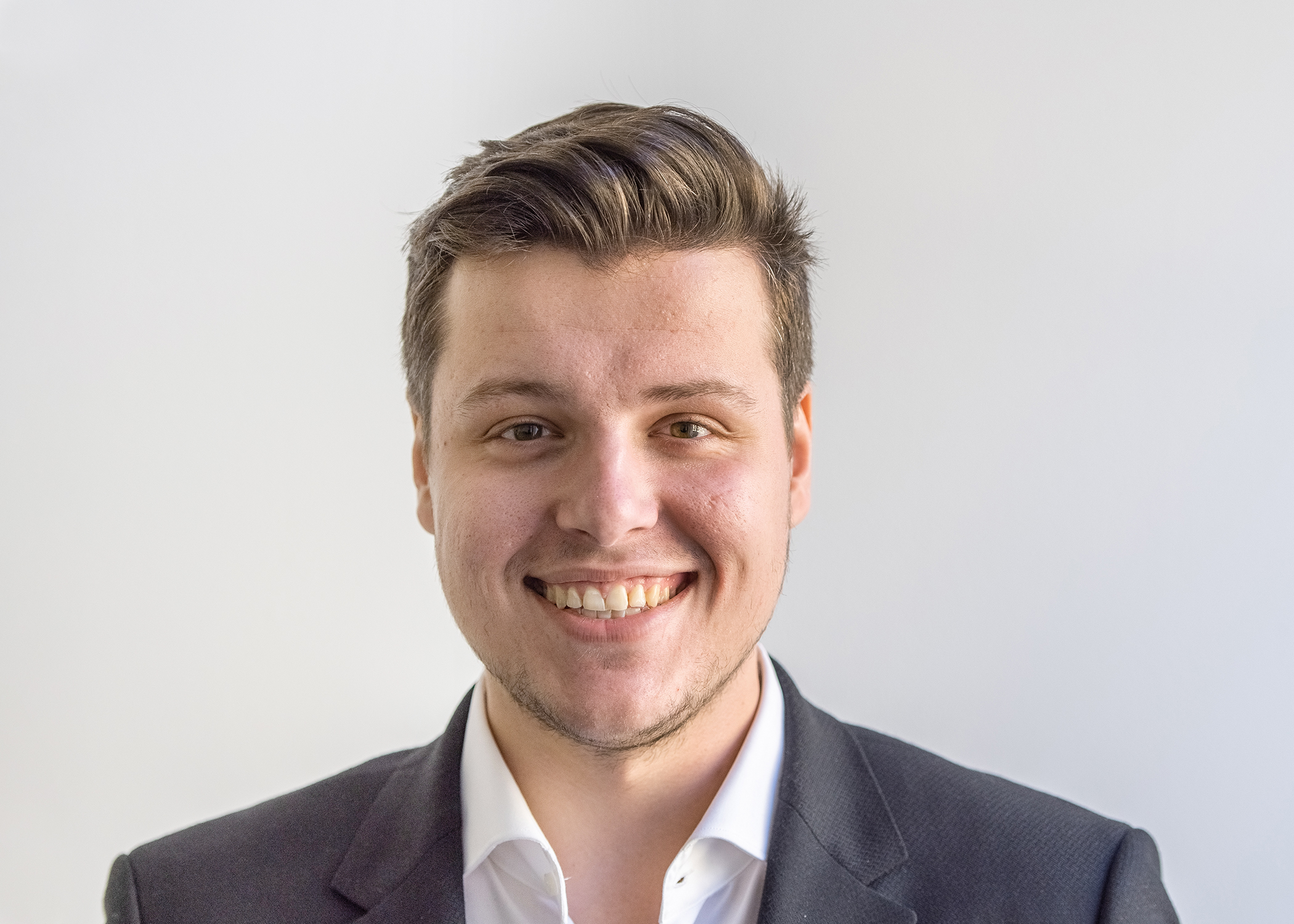 Ondřej Kania